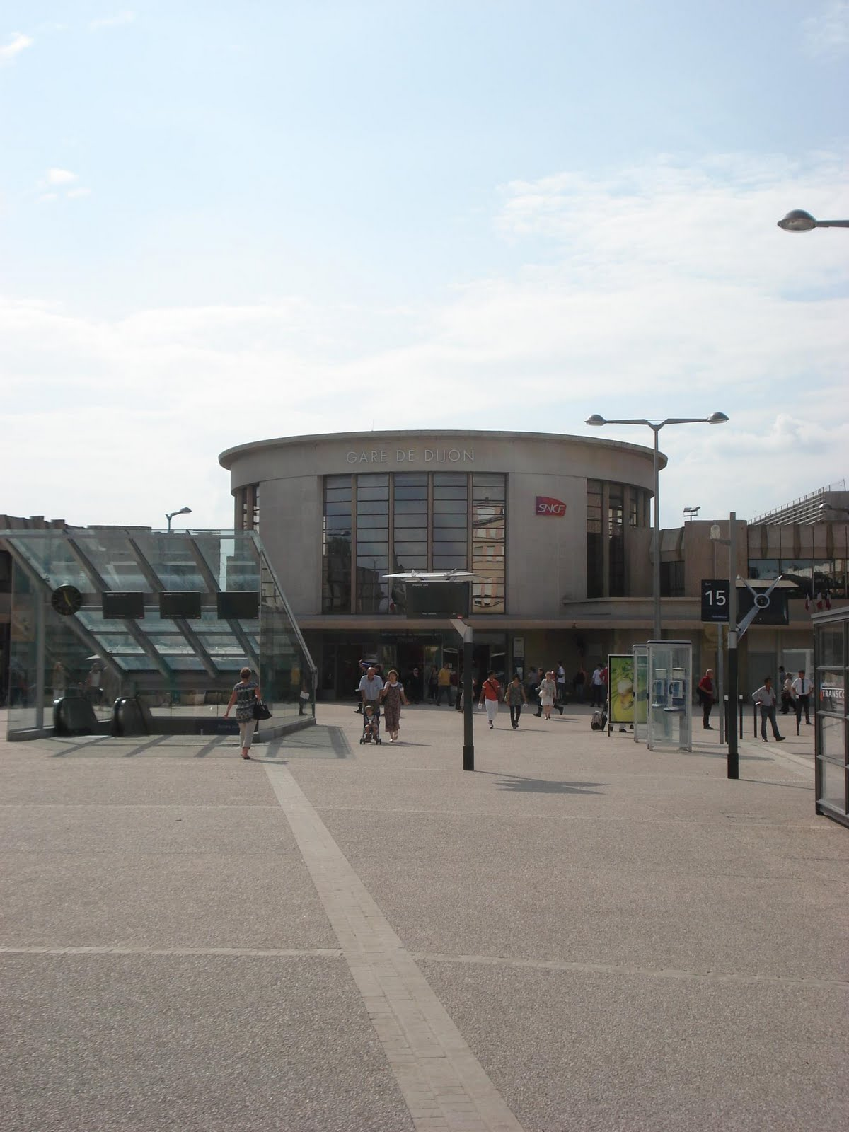 Entrée de la gare de Dijon-ville